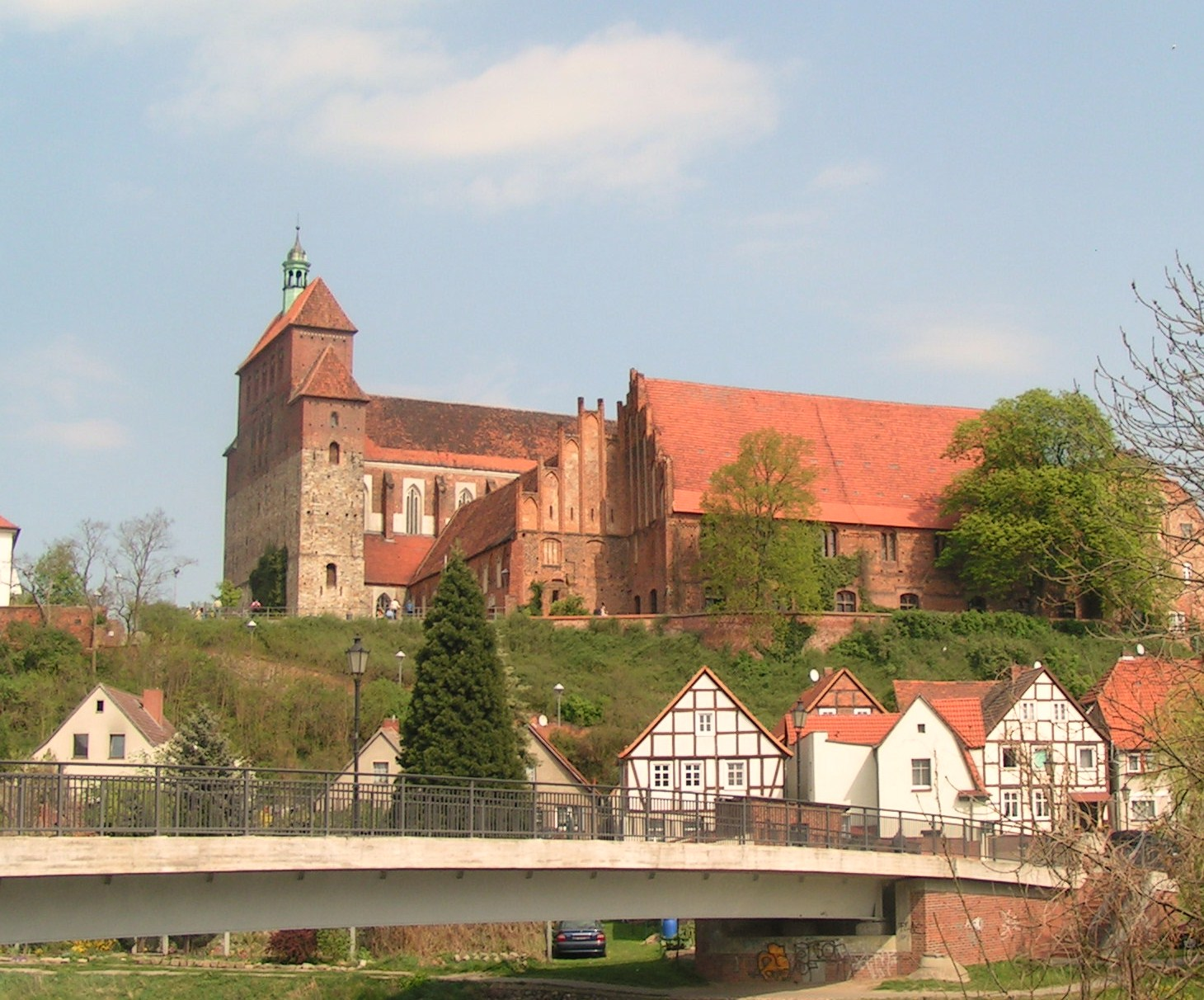 Havelberger Dom „St. Marien“ aus Richtung Altstadt.